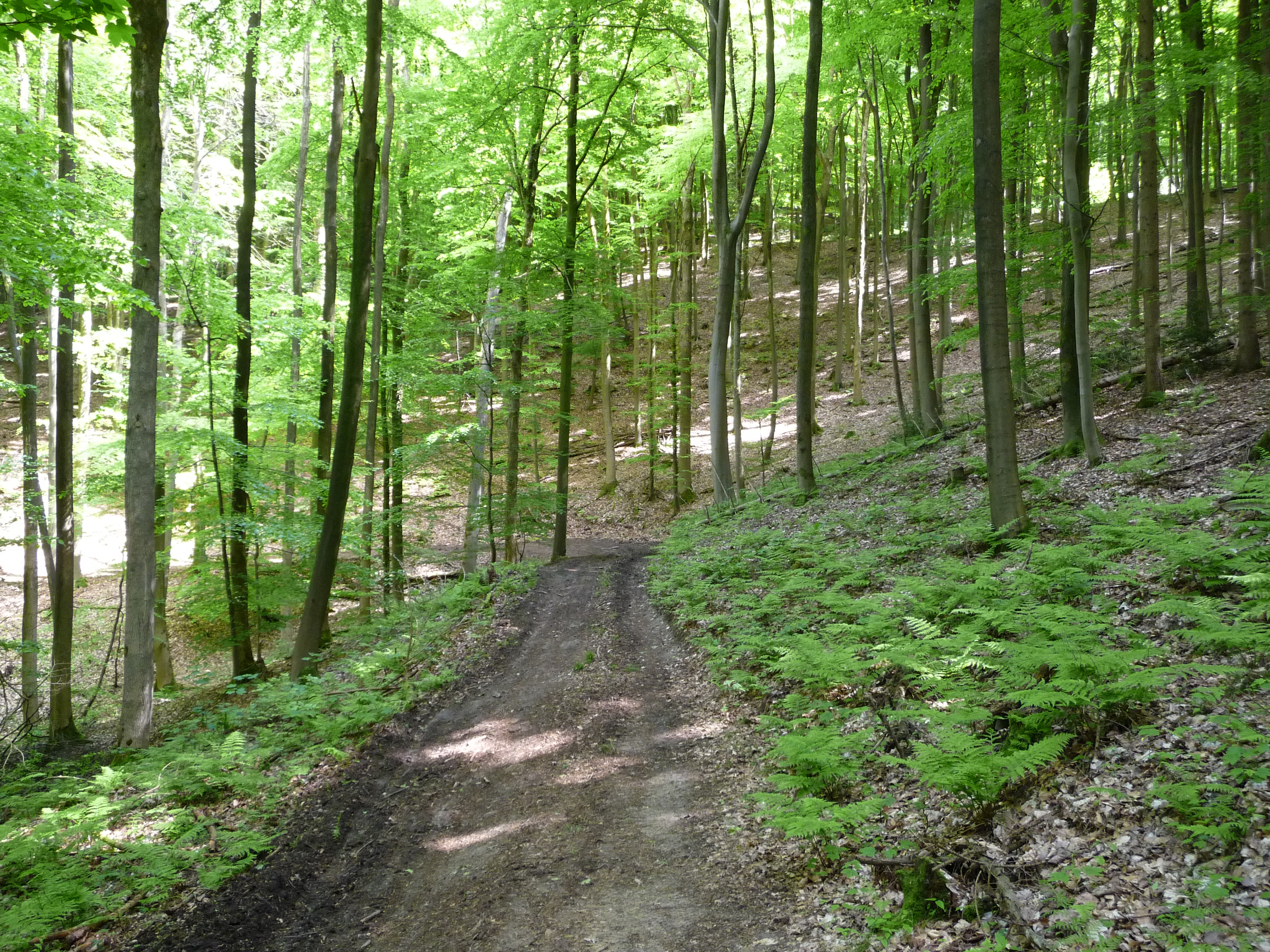 In der Nähe vom Forsthaus Limberg erhebt sich der Limberg / Offelter Berg in landschaftlich sehr reizvoller Umgebung.